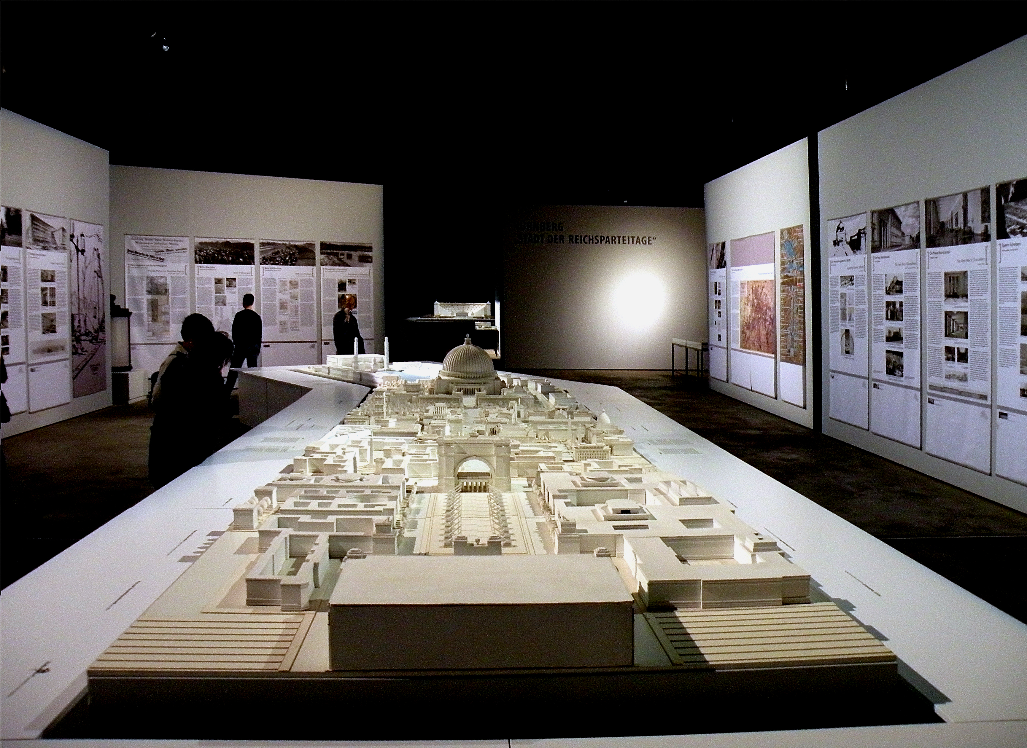 Экспозиция_Докуцентра.